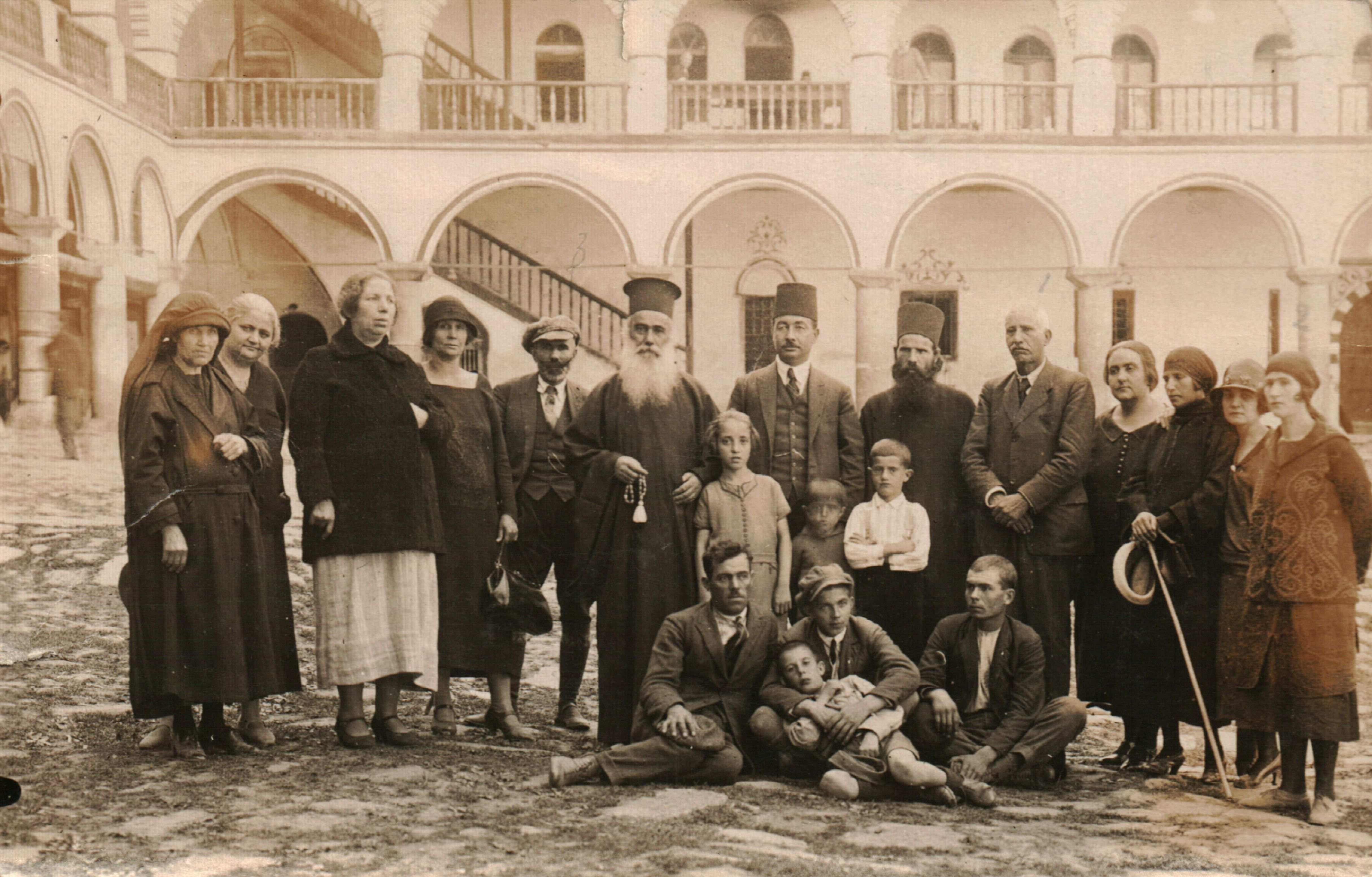 Снимка на на посещение на Рилси манастир от Д. Ачков Баялцалиев и др.